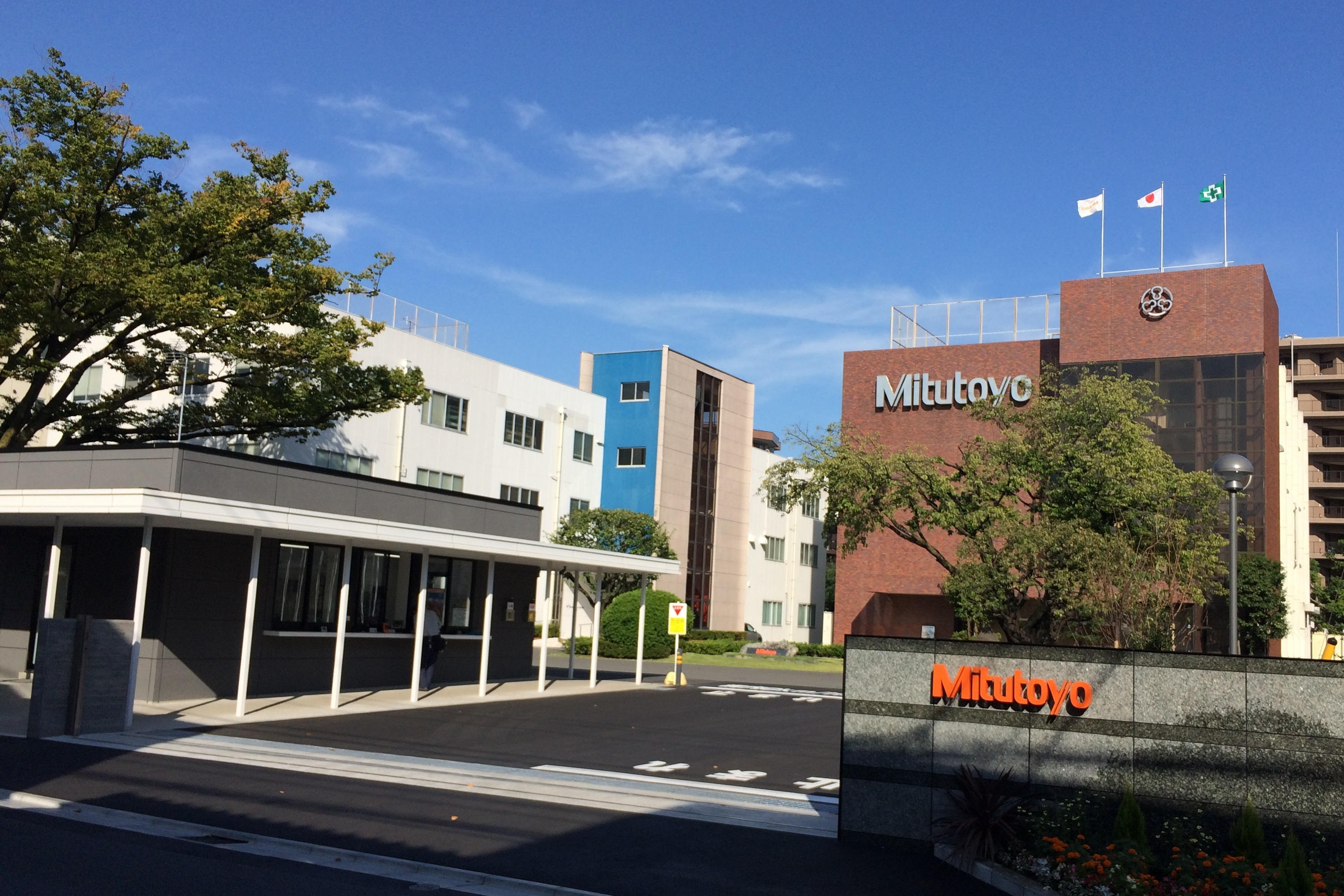 ミツトヨ 本社・正門